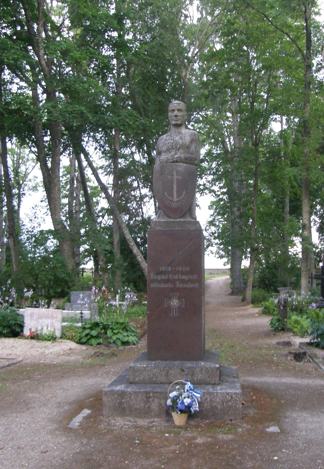 Torma Vabadussõja mälestussammas